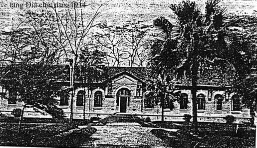 With permision from owner. Giấy phép Ảnh có trên 70 năm.